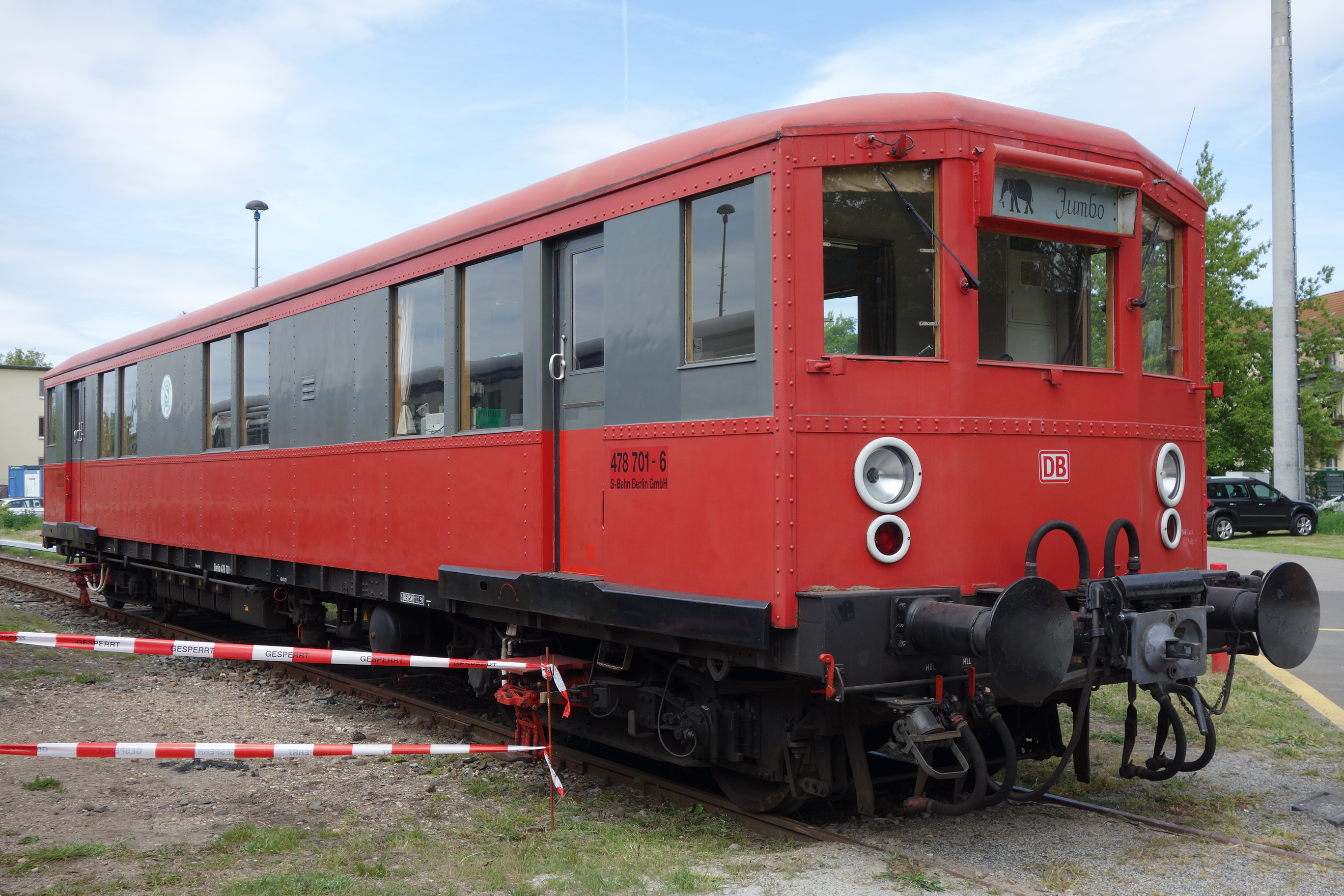 Zum Rangier- und Schlepptriebwagen ("Jumbo") umgebauter ET 168 vor der Triebwagenhalle Erkner der S-Bahn Berlin